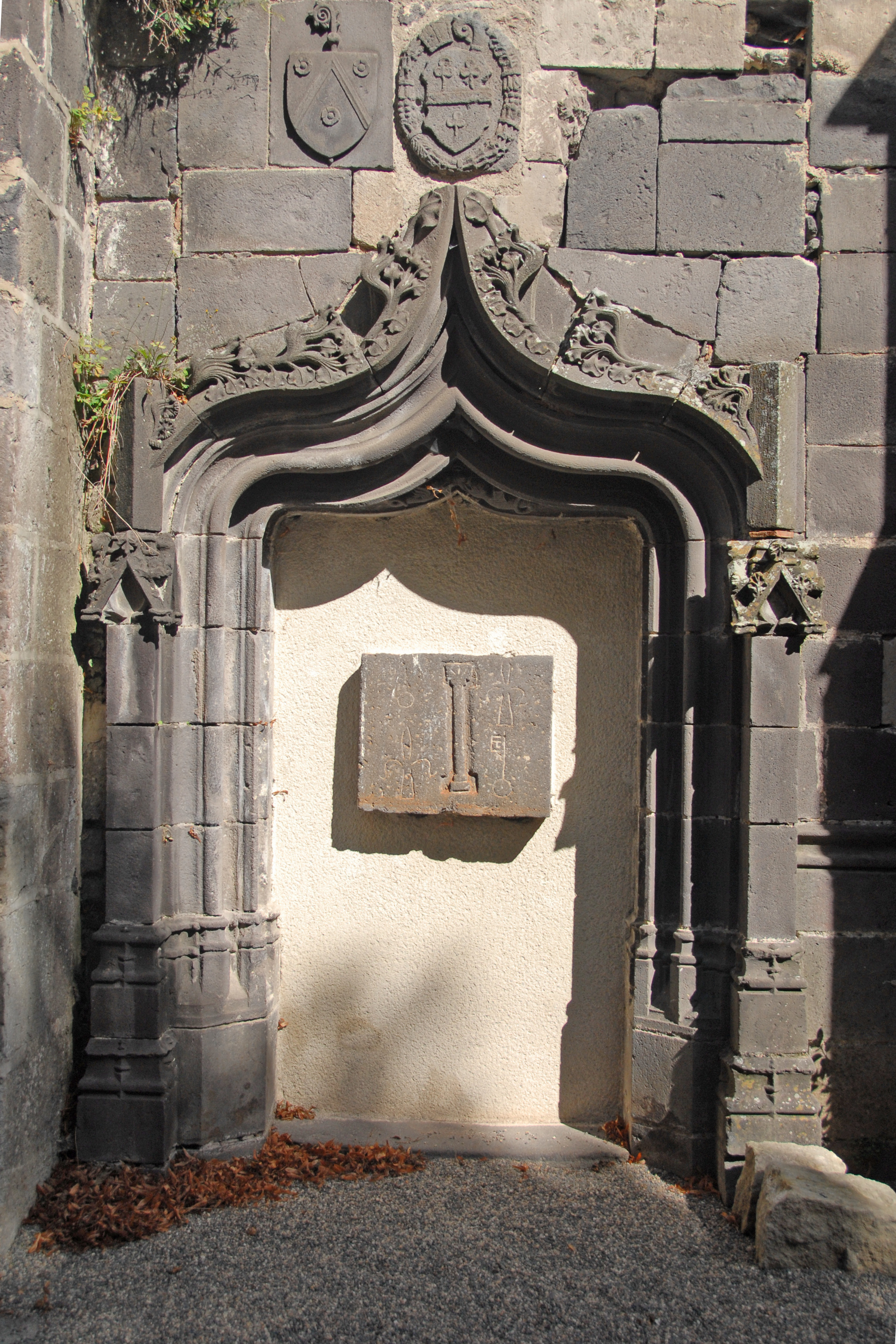 Mozat, goth. Nischeneinfassung in Joch 1